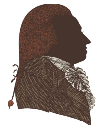 Silhouet Hendrik Verhees (1744-1813)